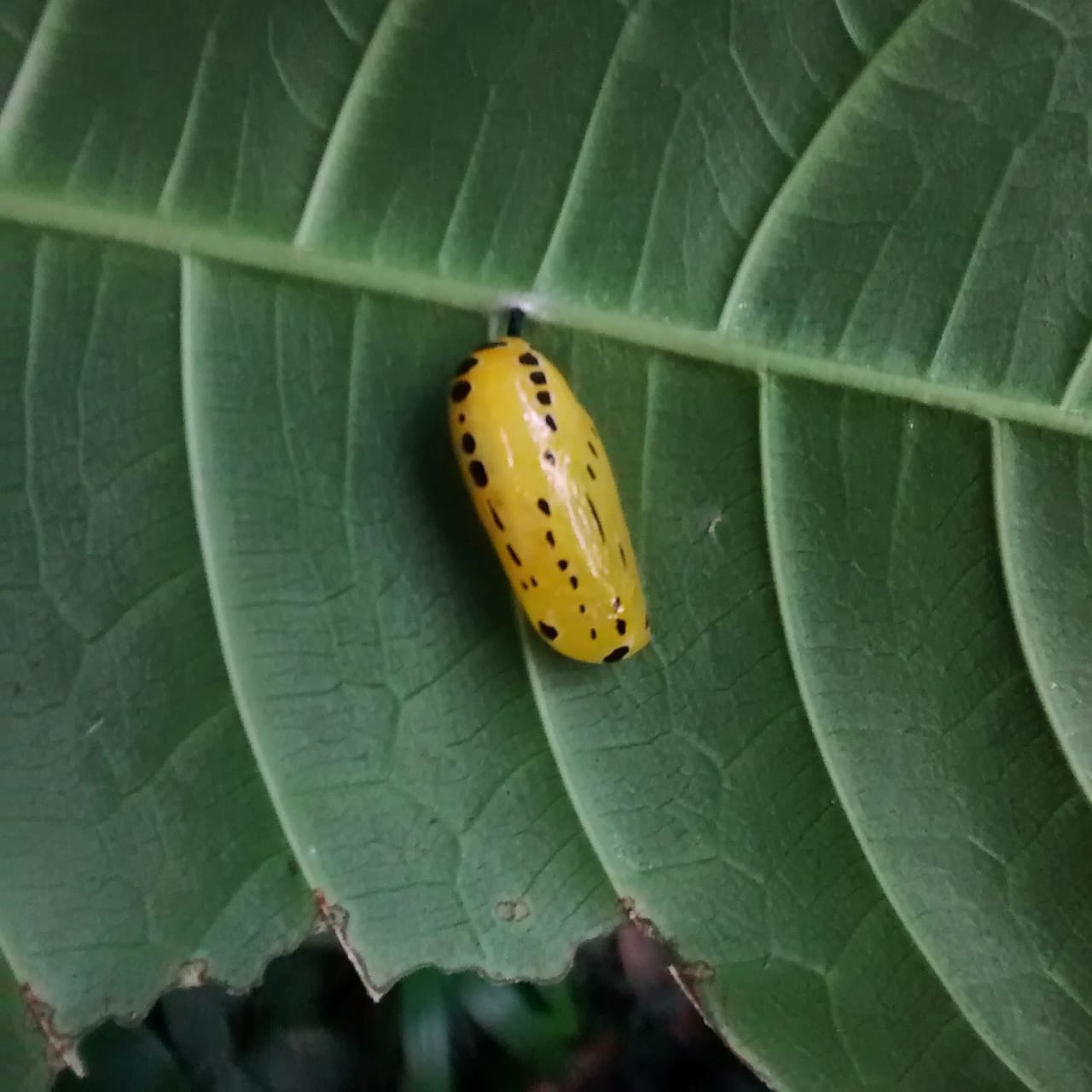 Foto de pupa de borboleta Methona Themisto, registrada em 08/06/2018, em monitoramento feito na Cidade Universitária - USP - SP. Foto por: Juliana Lira. Picture of Methona Themisto butterfly chrysalis, taked on June, 08th, 2018, in a monitoring at Cidade Universitária - USP - SP. Picture taked by: Juliana Lira.